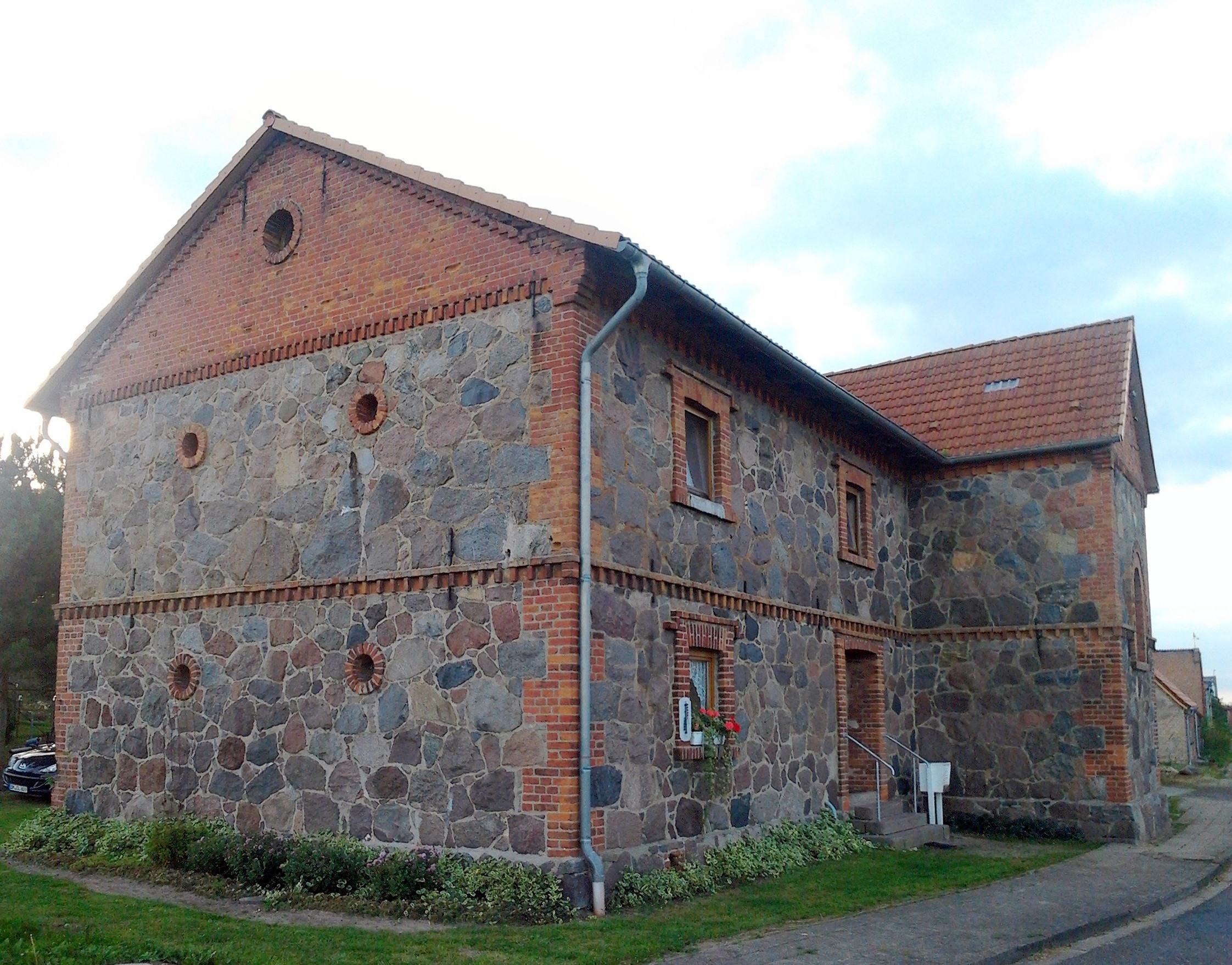 Feldsteinhaus (sogenanntes Hospital) in Unnode, Kruckow, Landkreis Vorpommern-Greifswald